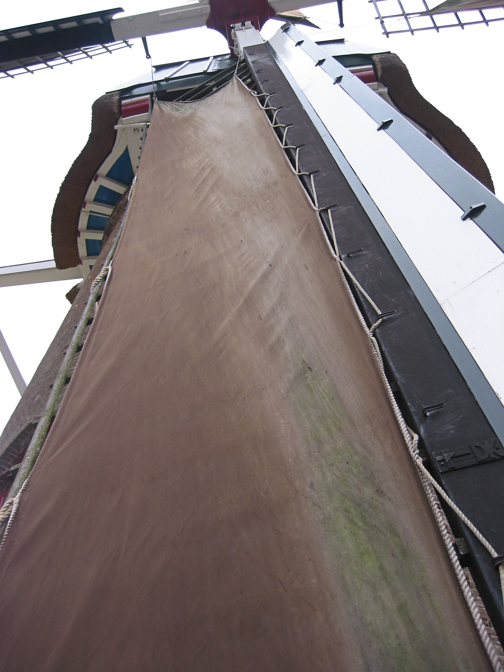 Molenzeil